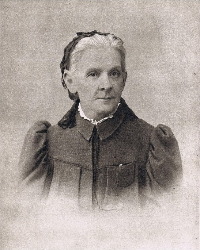 Vladimir I. Lenin's mother, Maria Alexandrovna Ulyanova (1835 - 1916)